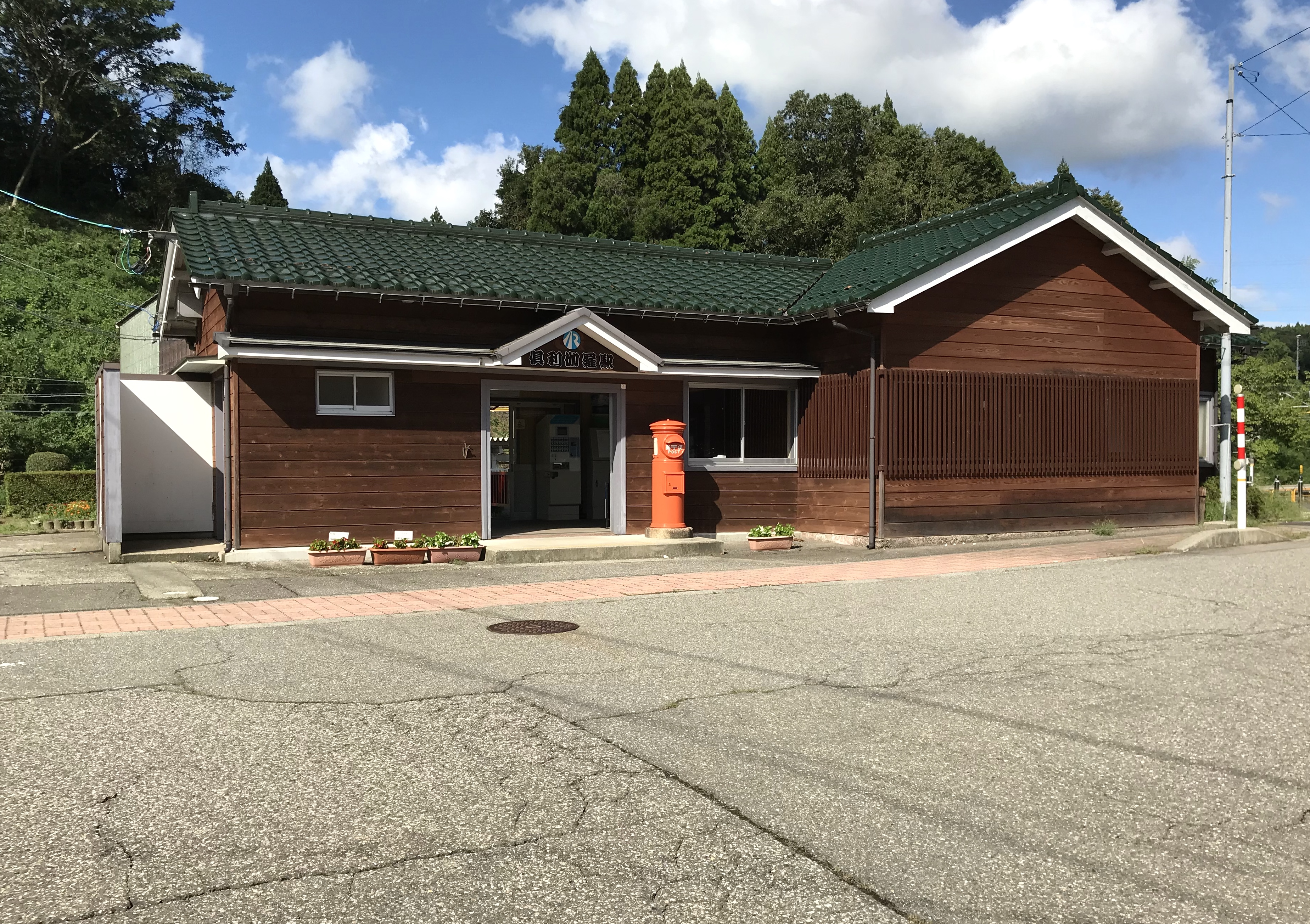 IRいしかわ鉄道倶利伽羅駅駅舎